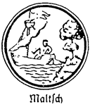 Reprodukcja odcisku pieczętnego Malczyc